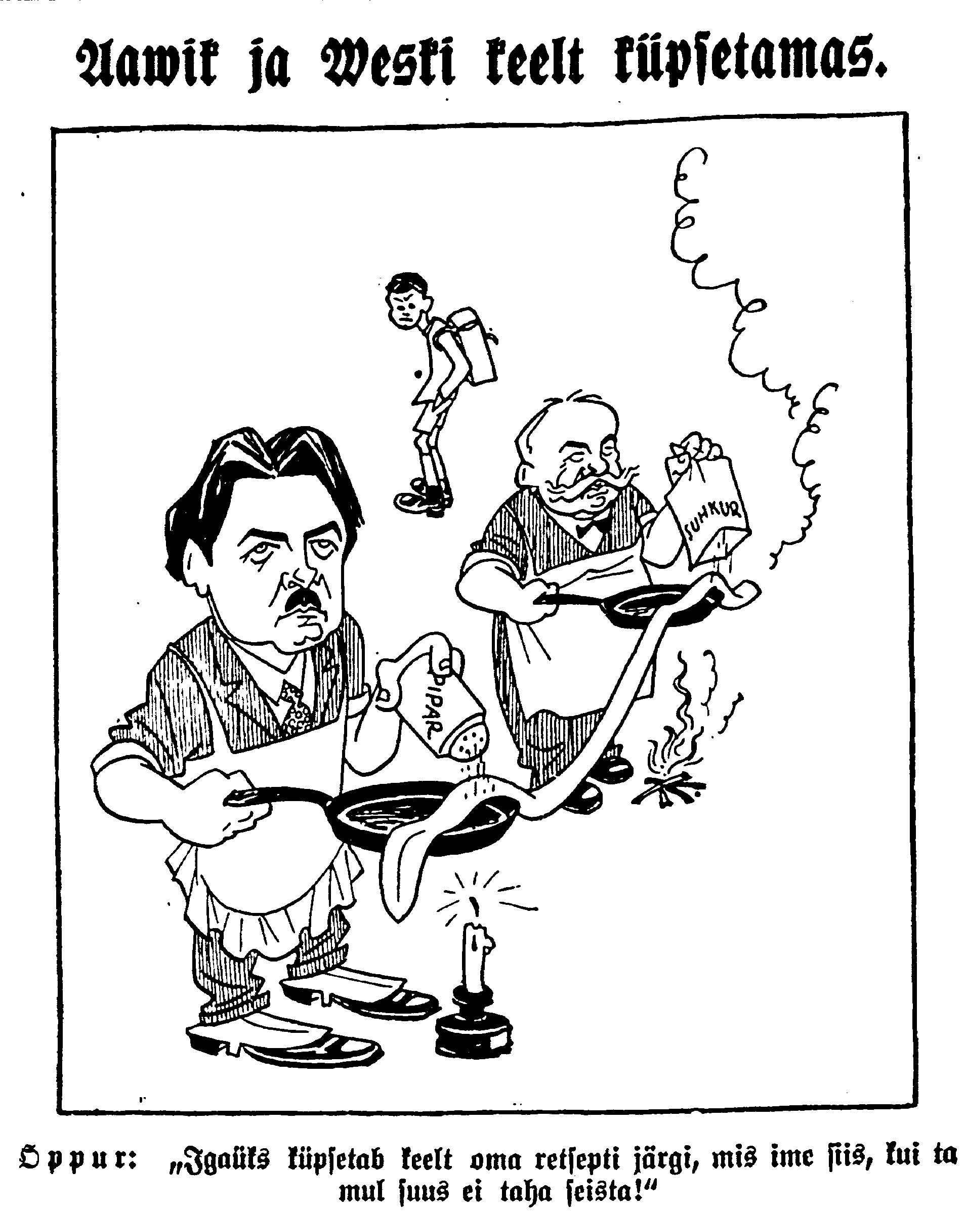 Aavik ja Veski keelt küpsetamas